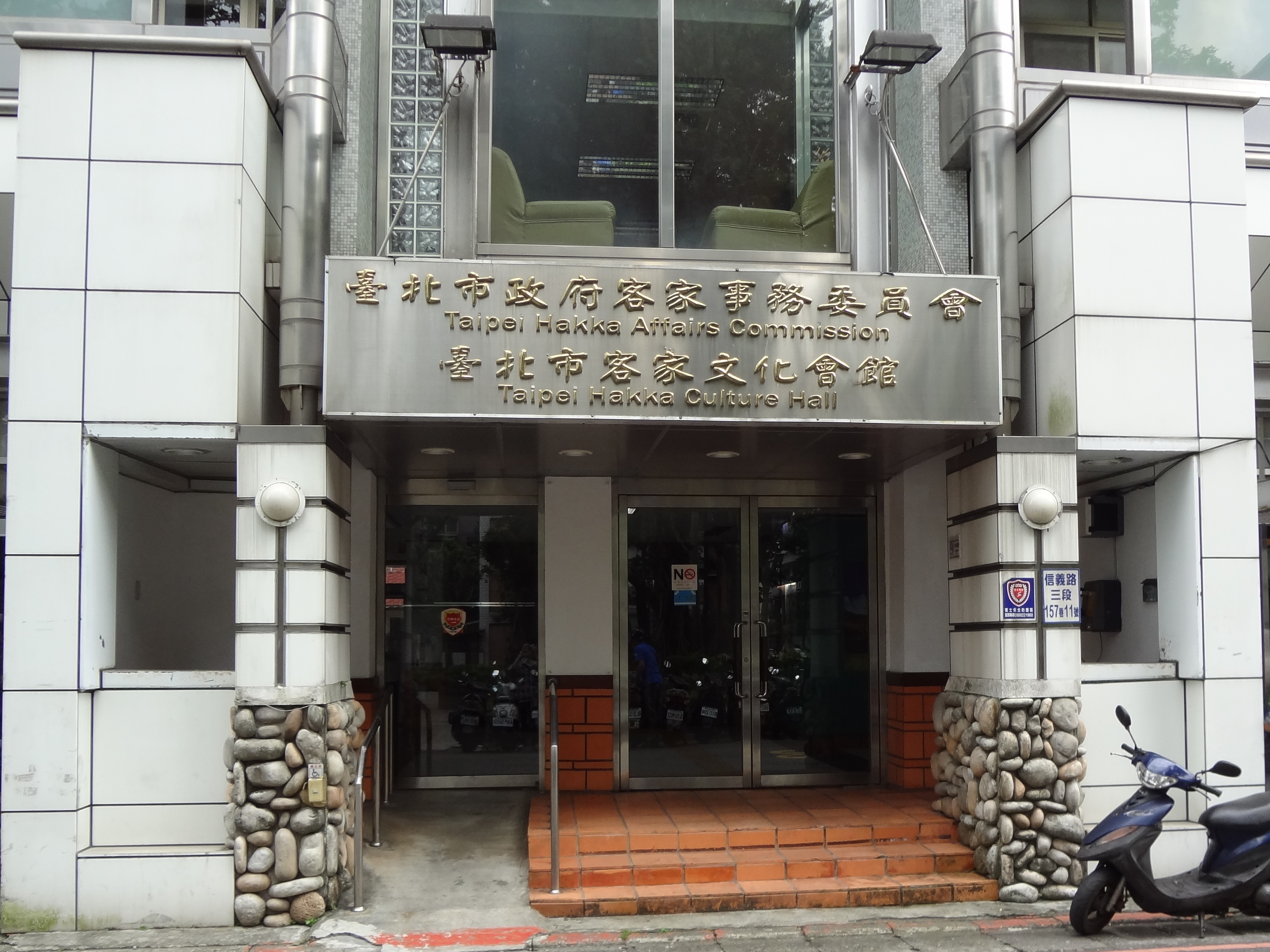 臺北市客家文化會館大門，懸掛臺北市政府客家事務委員會與臺北市客家文化會館鑄字招牌。